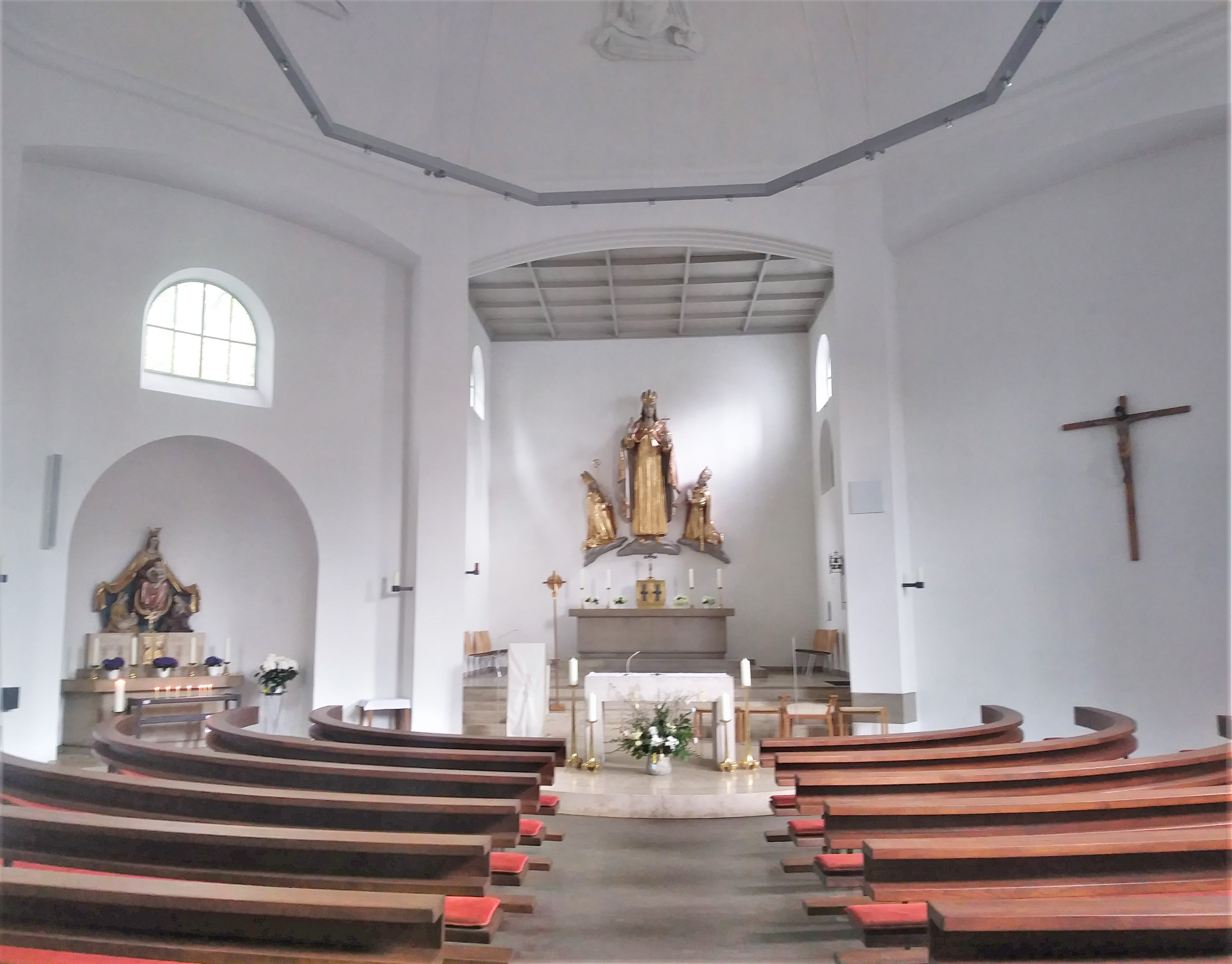 Saint Otto of Bamberg Church (Ottobrunn)